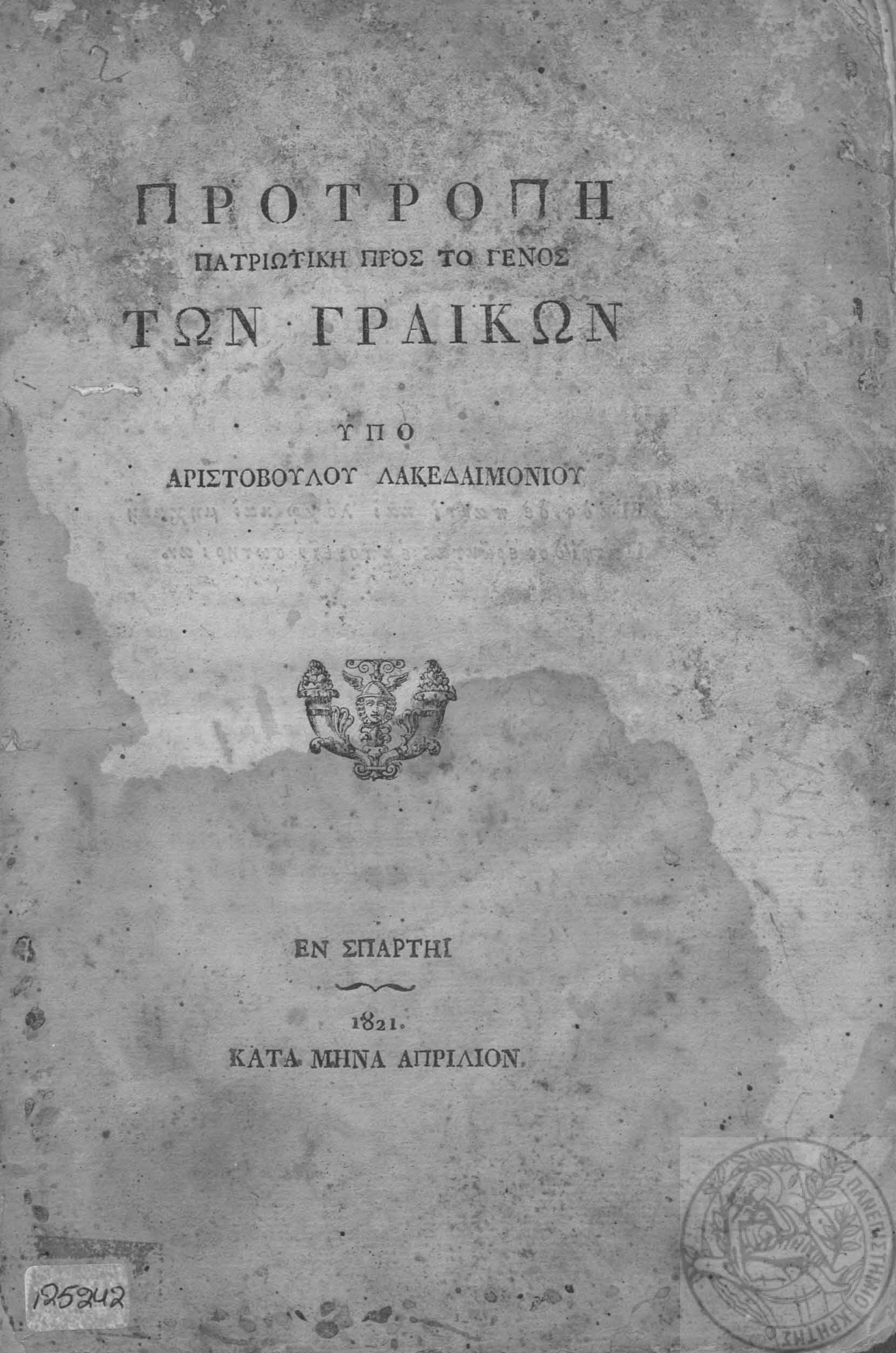 Title page of Protropi patriotiki pros to genos ton grekon(Προτροπή πατριωτική προς το γένος των γραικών)